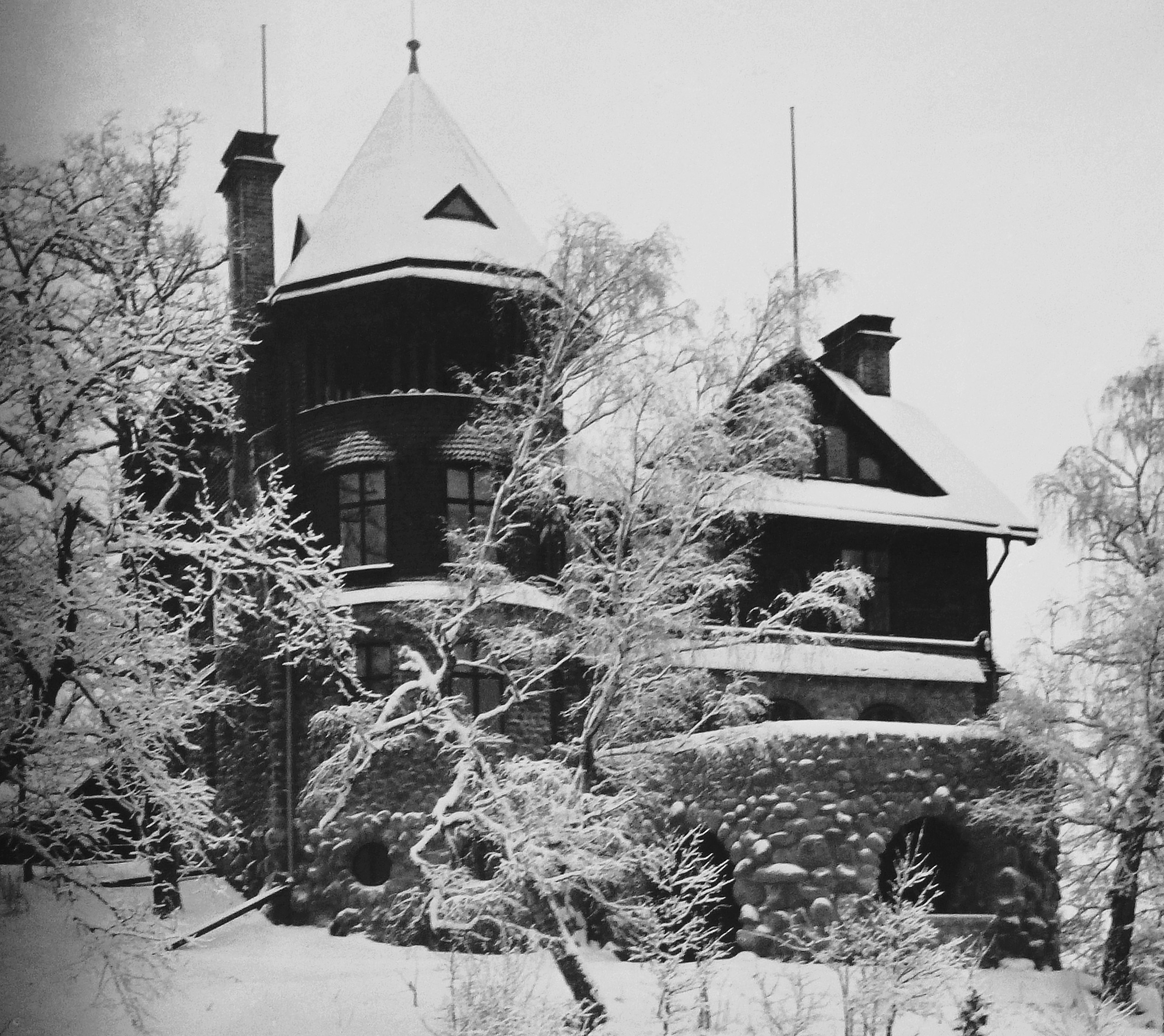 Fastigheten Odilslund 9, Djursholm